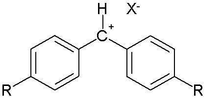 Benzhydrylium ion